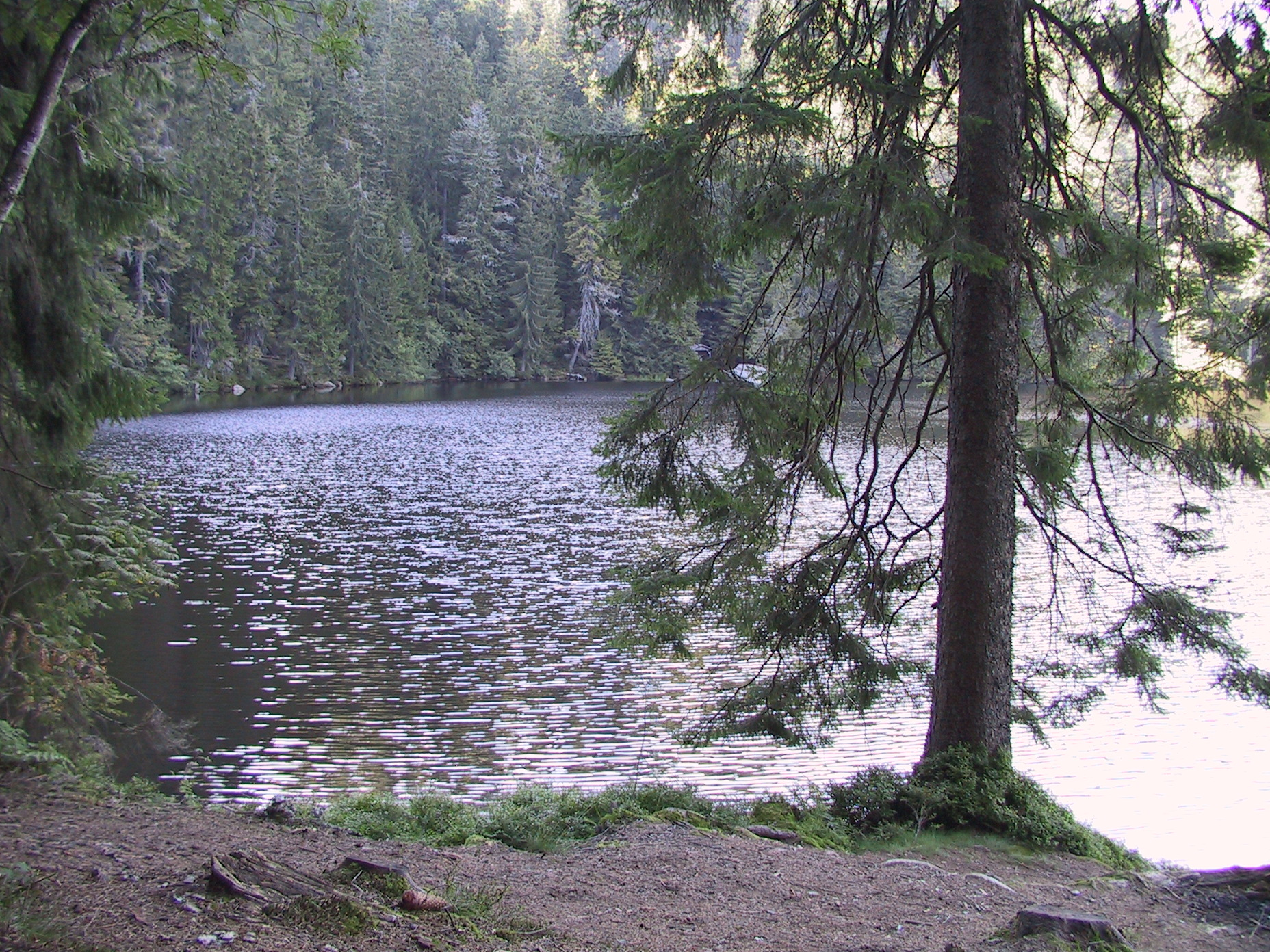 Der Glaswaldsee bei Bad Rippoldsau-Schapbach